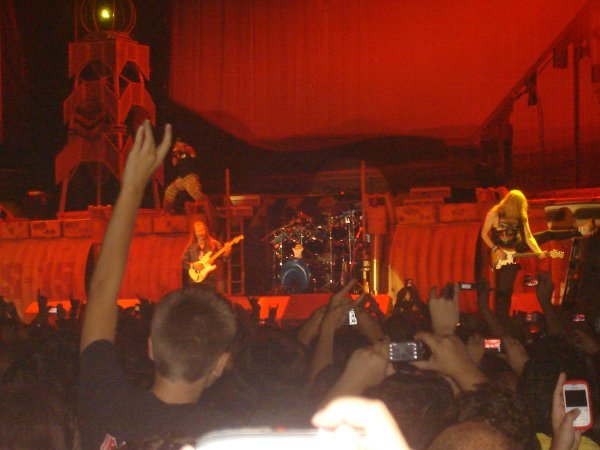 Aquesta és una foto que vaig fer al concert d'Iron Maiden a València el dia 21 d'agost de 2010.